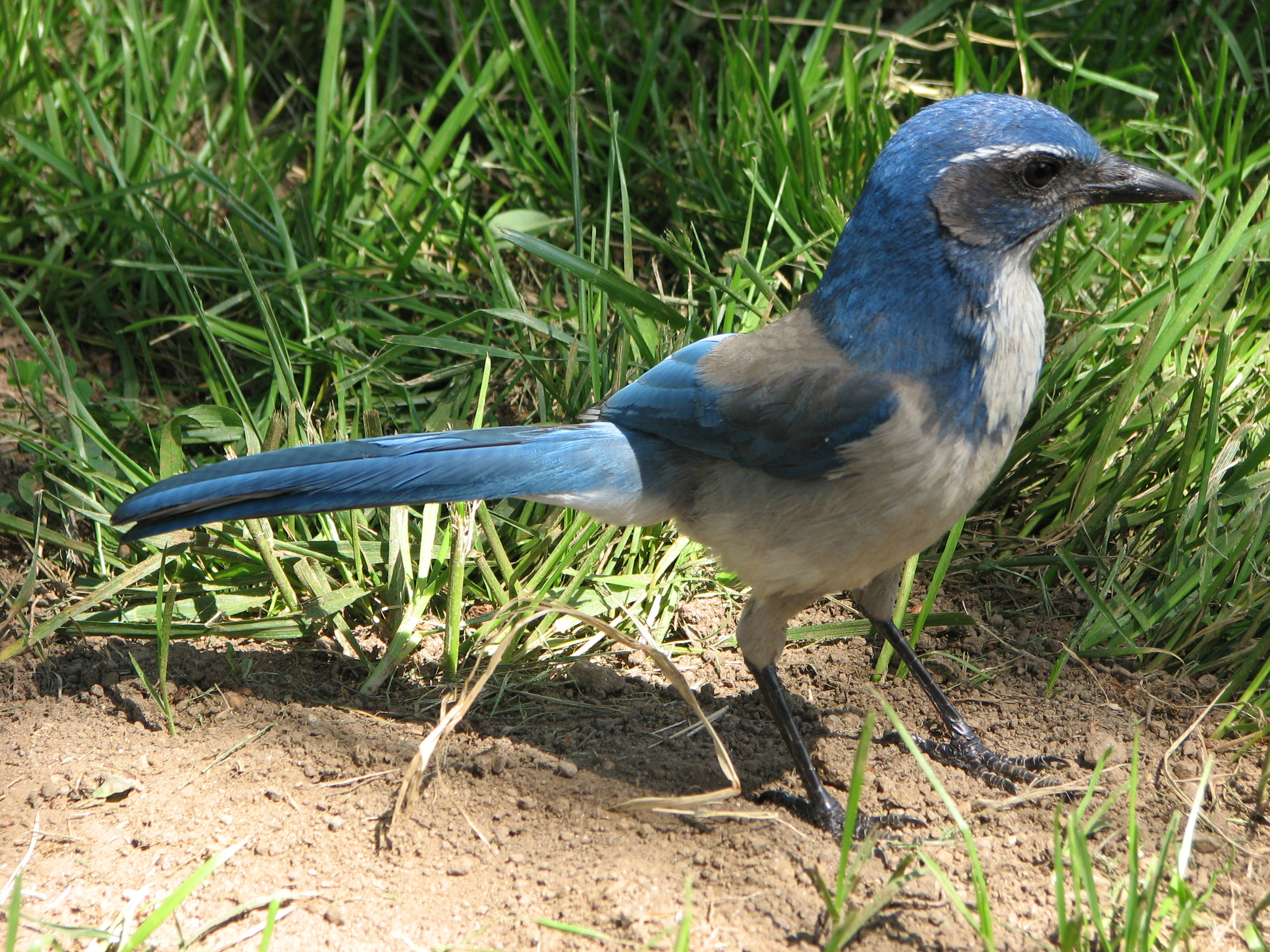 Un geai buissonnier dans le "Sequoia National Park" en Californie. Photo personnelle, 2007.